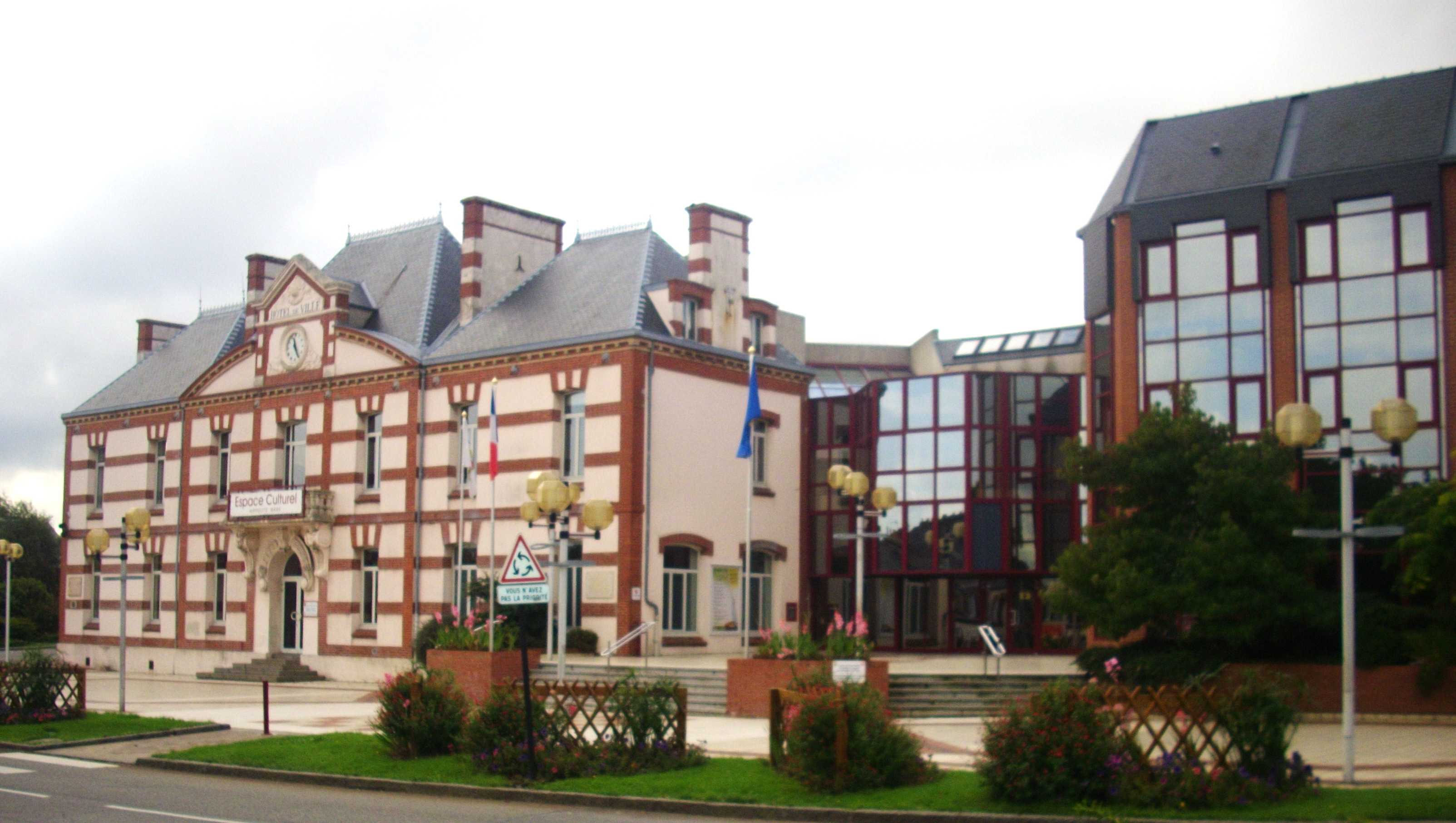 Vue de la place Hippolyte Mars, avec l'ancienne mairie, aujourd'hui centre culturel, et l'actuel hôtel de ville.